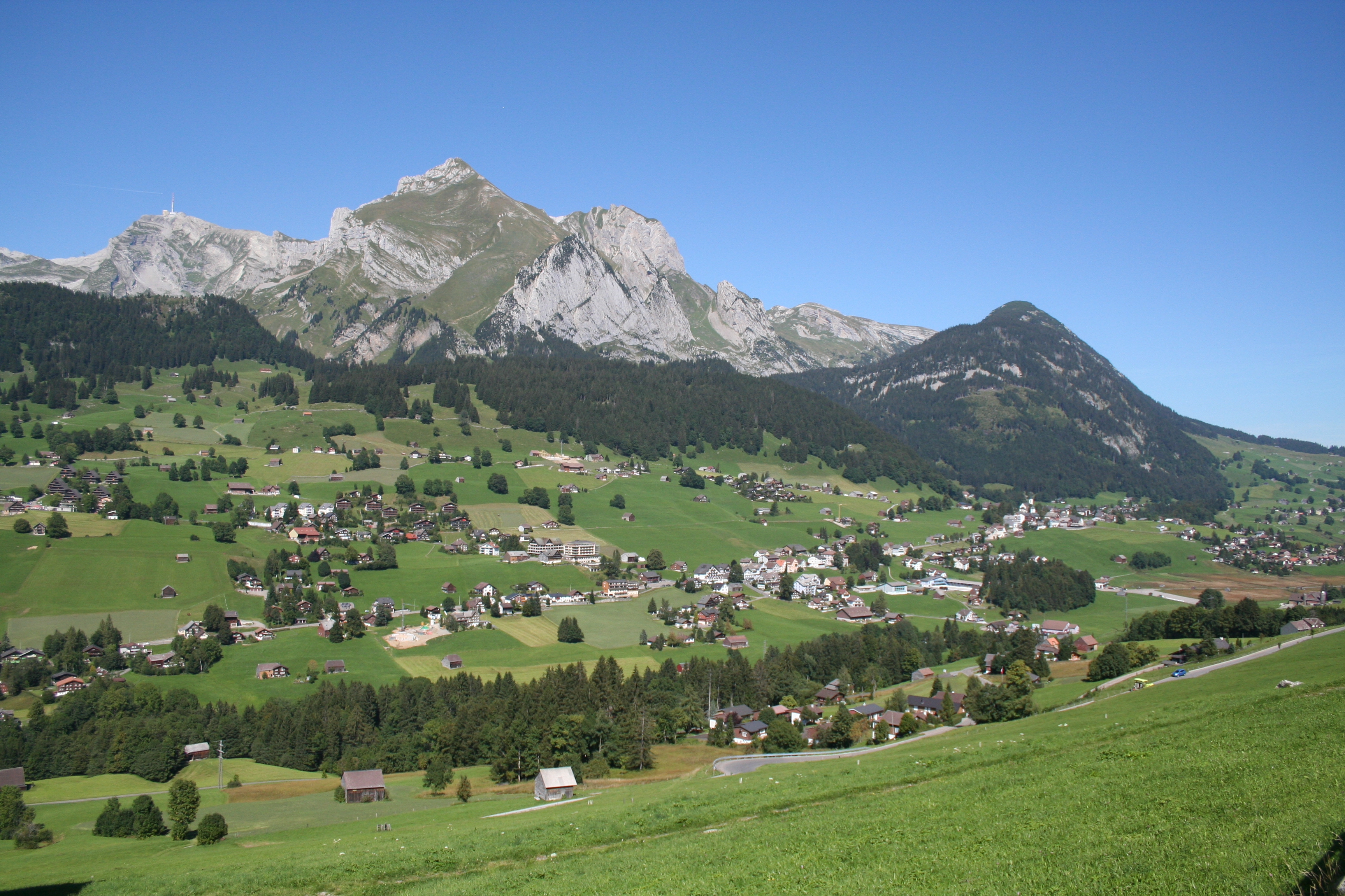 Wildhaus SG